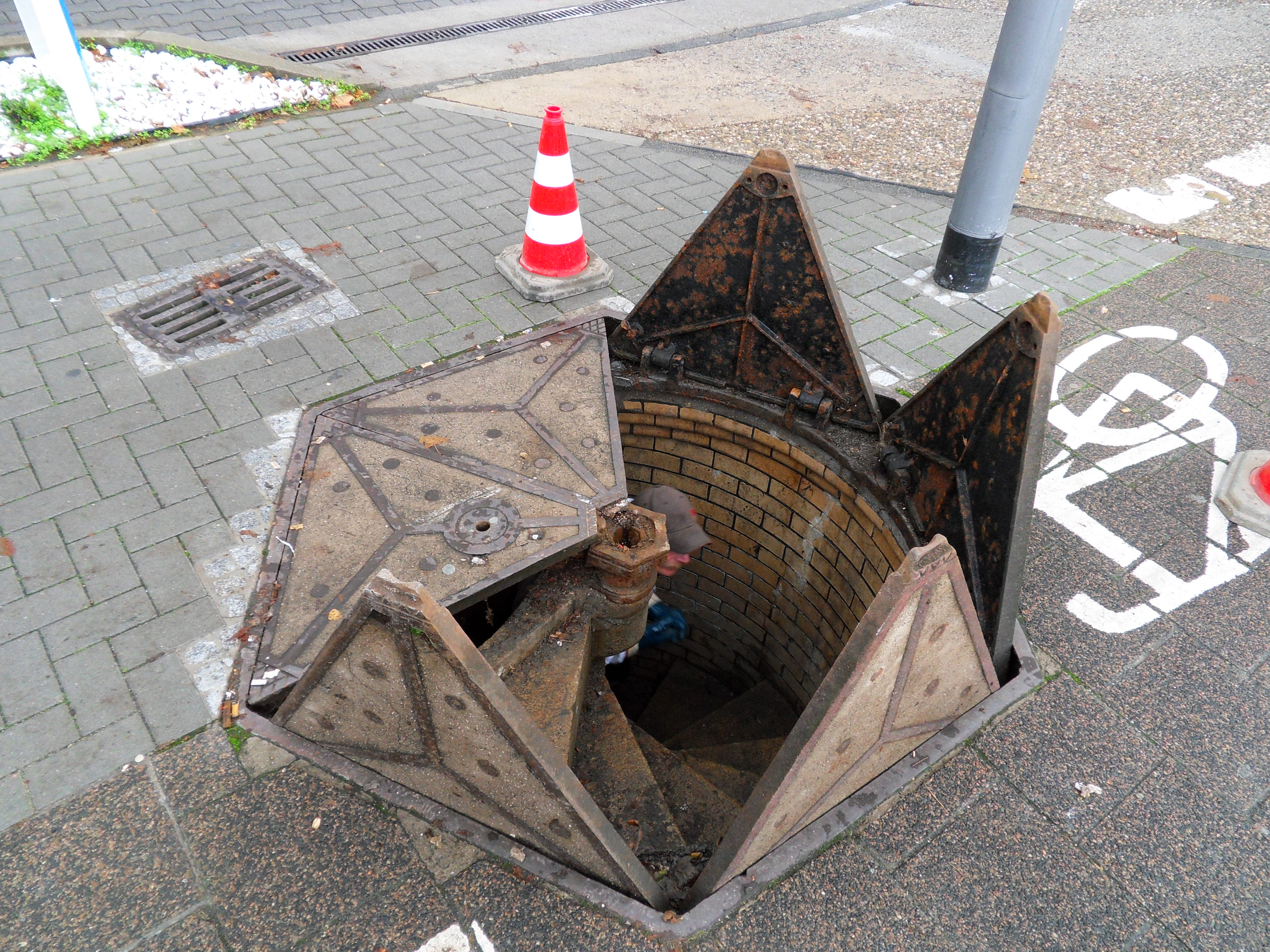 Zugangsschacht zum Salzbachkanal, dem Hauptentwässerungskanal der Wiesbadener Innenstadt am Bahnhofsplatz / Gustav-Stresemann-Ring mit sechsfach geteilter Abdeckung und Wendeltreppe. Der Schacht ist zu Wartungsarbeiten geöffnet, weil große Mengen von mit Beton versetztem Wasser aus dem Geothermie-Bohrloch am Finanzministerium durch die Kanalisation abfließen.